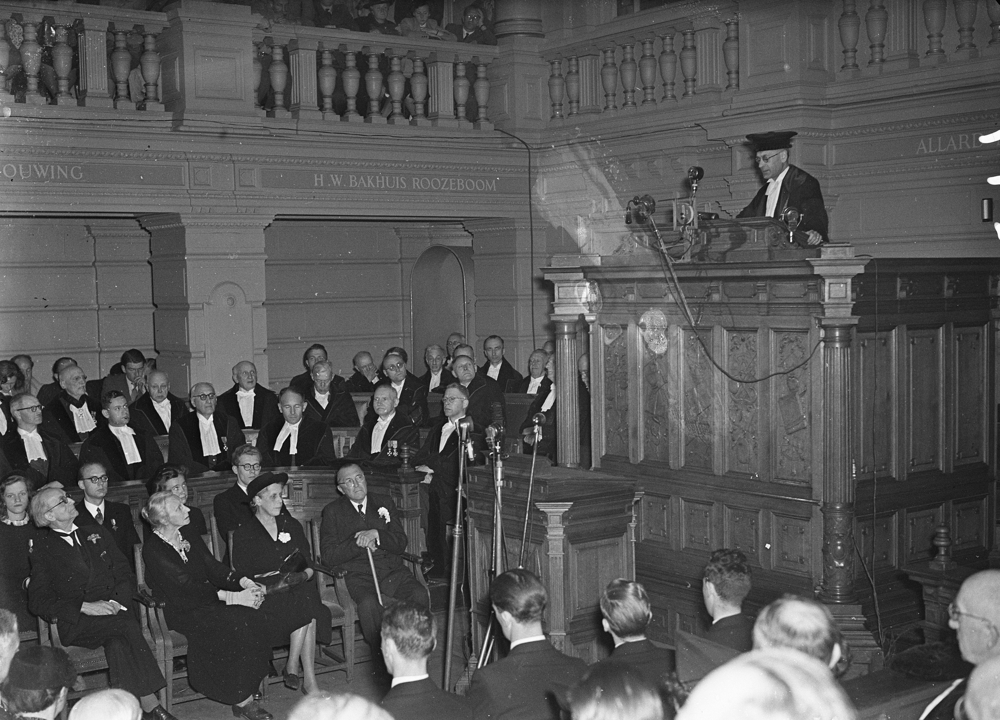 Eredoctoraten Universiteit van Amsterdam voor v.l.n.r. Kamiel Huysmans, Henriëtte Roland Holst-van der Schalk, Nelly Benjamins (voor P.N. van Eyck) en Herman Teirlinck, 20 mei 1947. Spreker is waarschijnlijk Jan Romein.